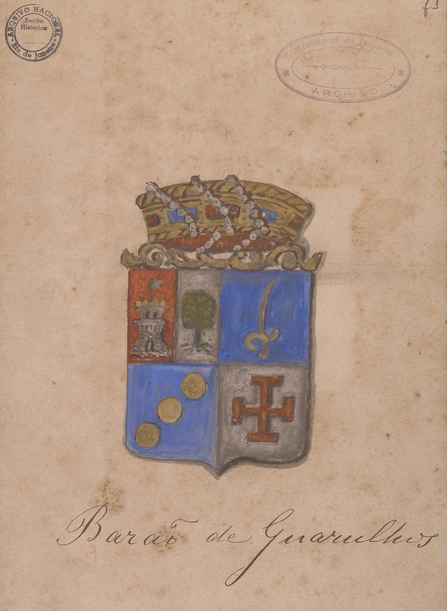 Brasão de José Joaquim de Moraes, Barão de Guarulhos (SP). Fundo: Brasões.